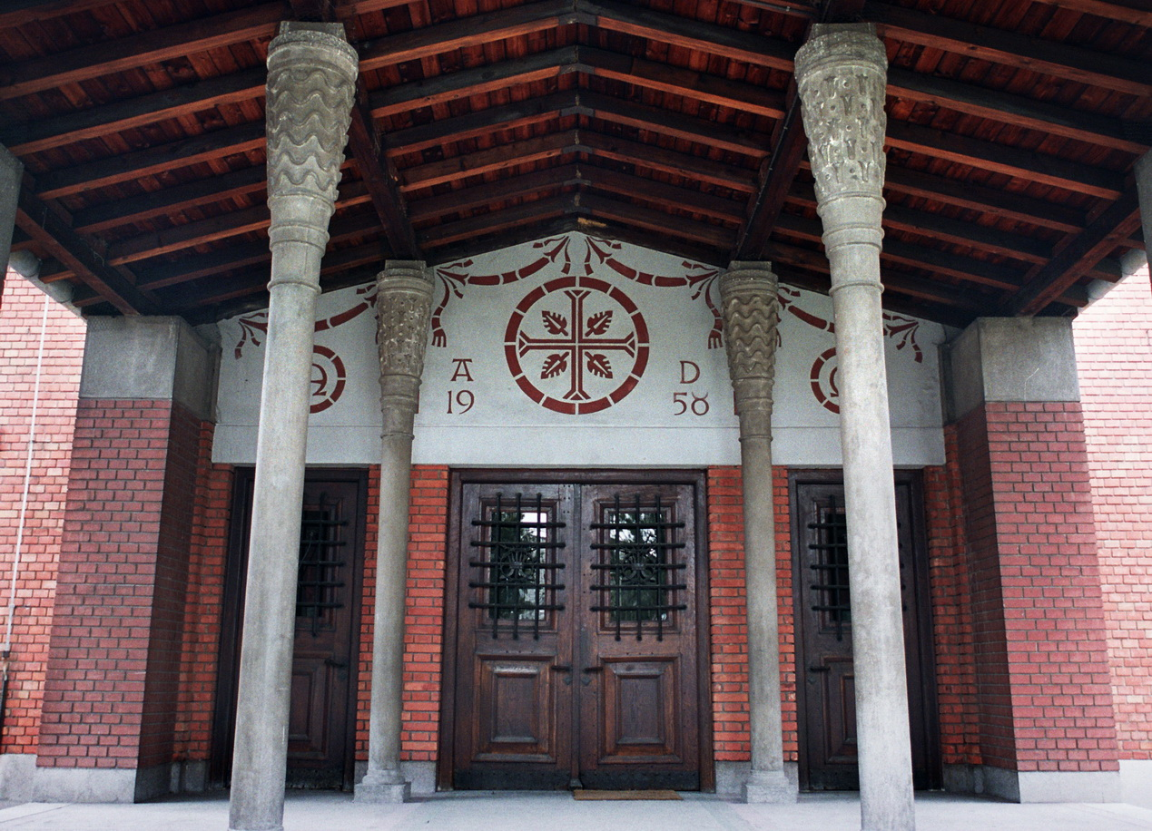 Српски (ћирилица): Улаз у цркву